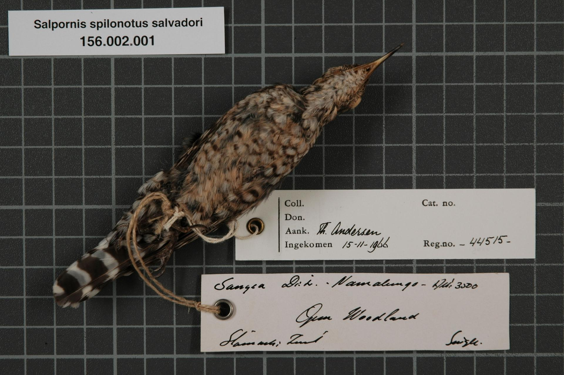 Salpornis spilonotus salvadori (Bocage, 1878)